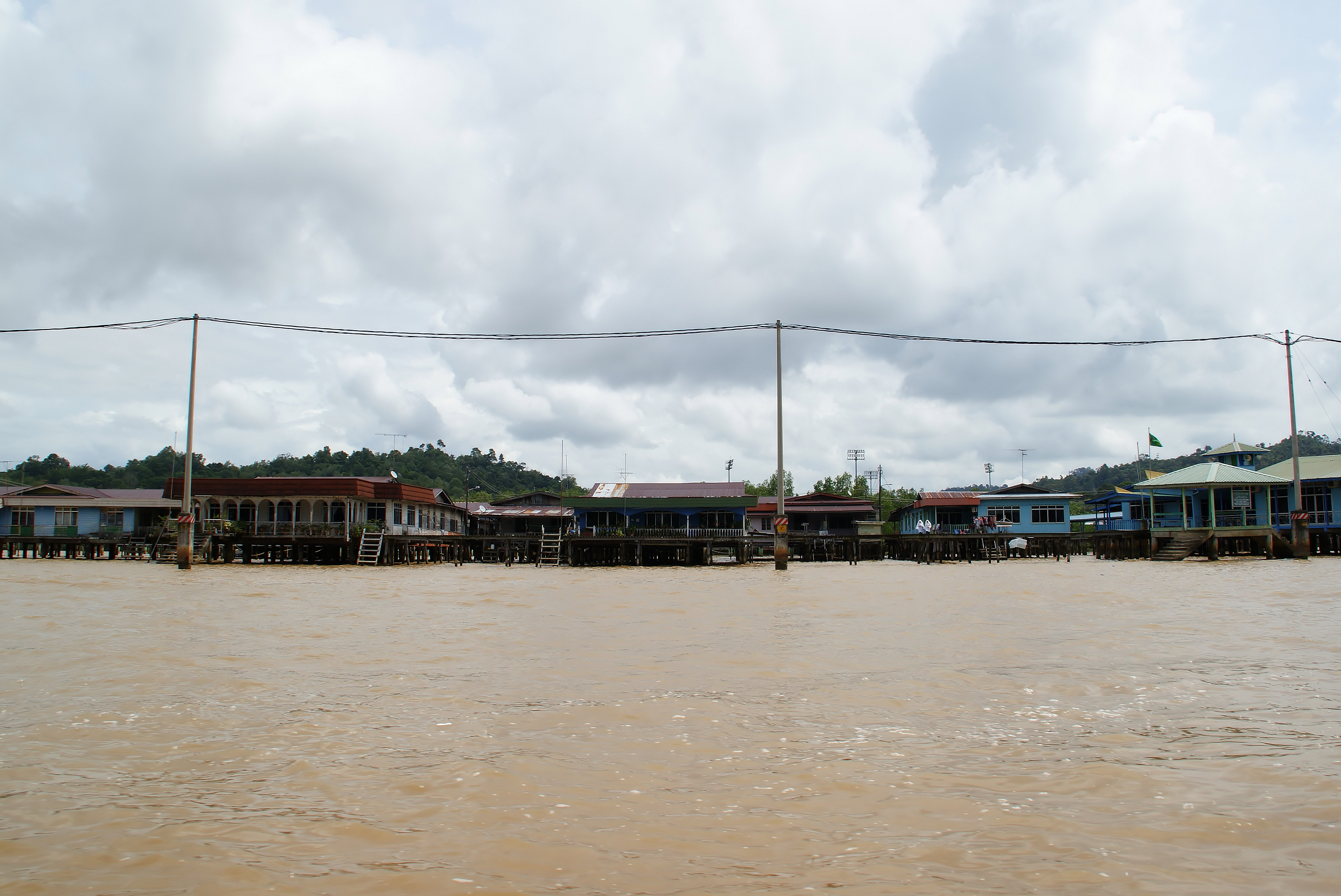 Kampong Ayer.(Bandar Seri Begawan, Brunei Darussalam)